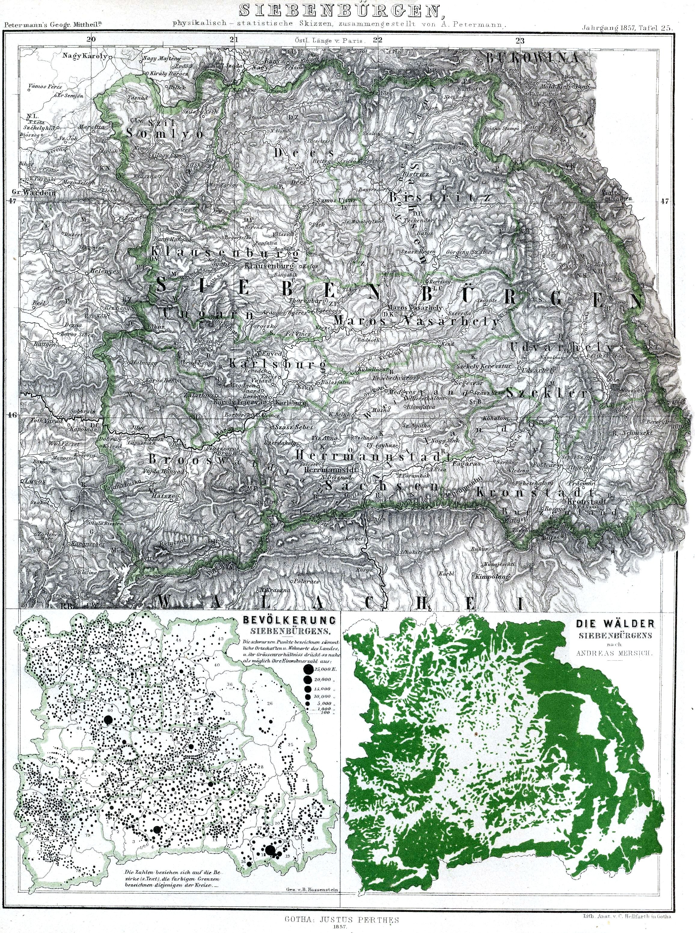 Das Großfürstentum Siebenbürgen in 1857 und die 3 ständischen Nationen (Ungarn, Sachsen und Szekler) von A. Petermann (1822-1878)